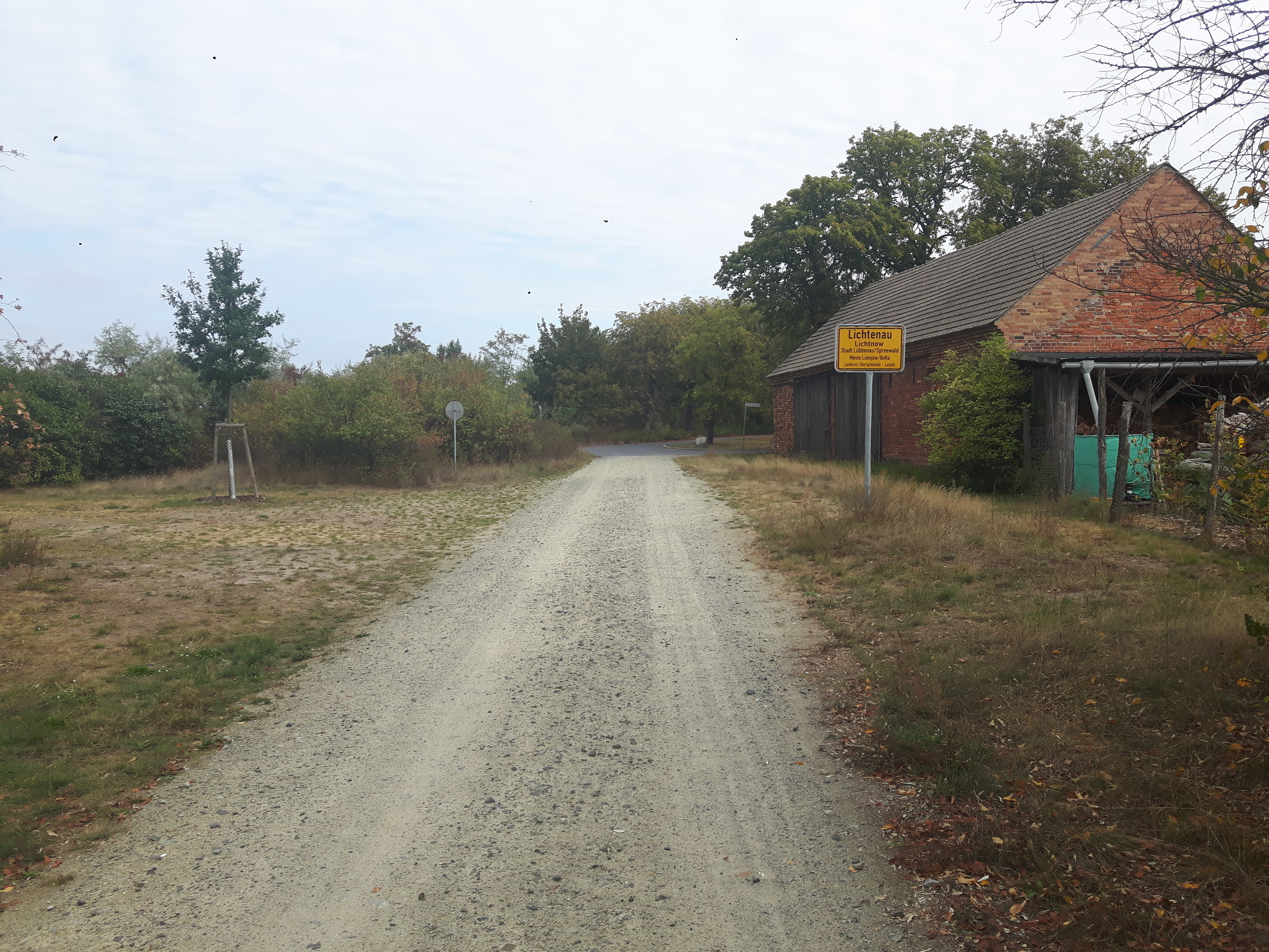 Ortseingang von Lichtenau, einem Dorf bei Lübbenau im Landkreis Oberspreewald-Lausitz in Brandenburg, aus Zinnitz kommend.